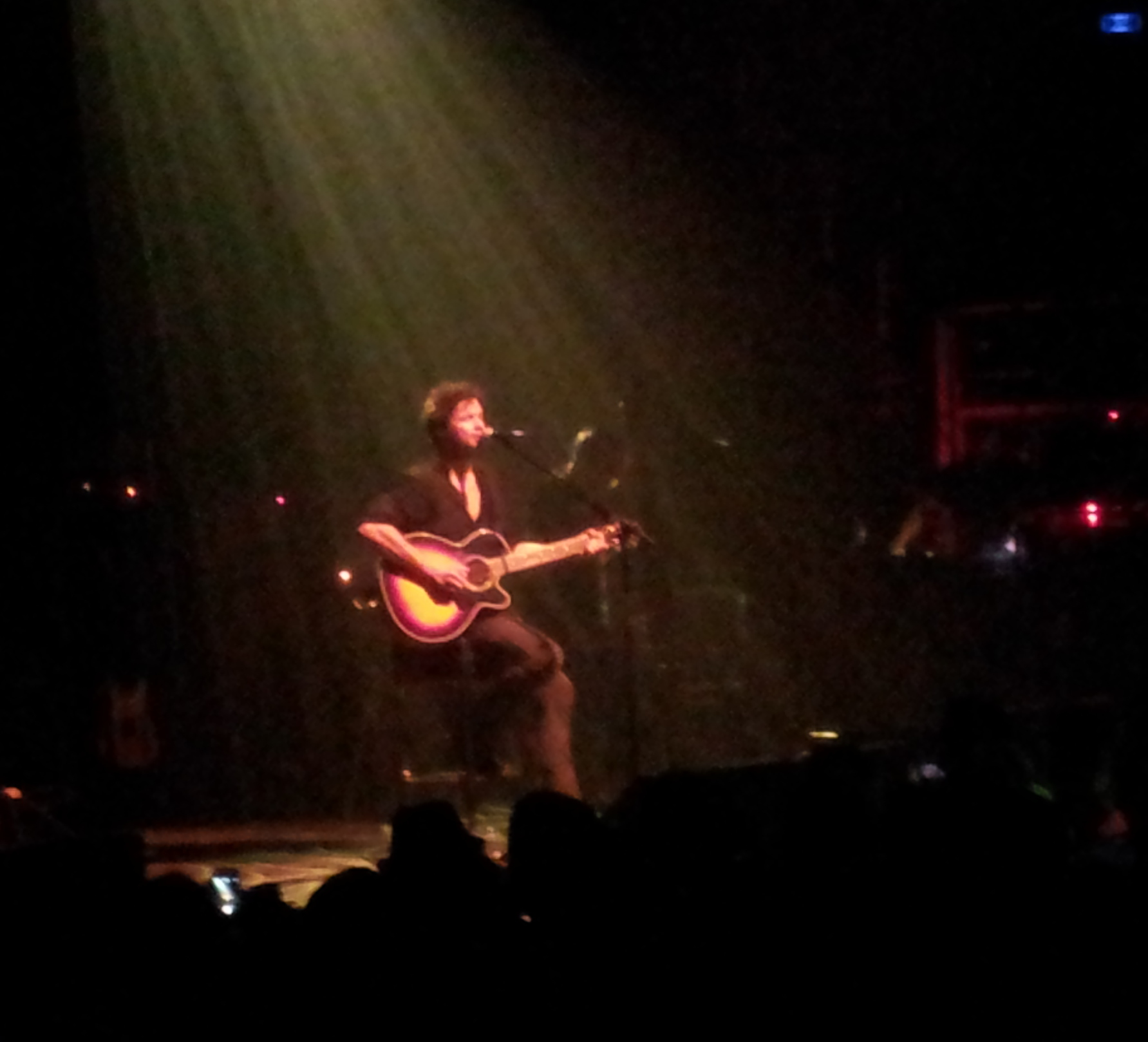 Concert de Detroit au Cirque Jules-Verne à Amiens en mai 2014.